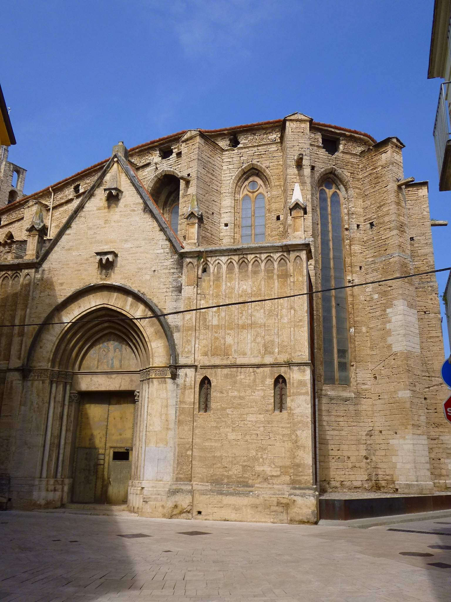 Iglesia de Santa Maria dels Turers (Banyoles)